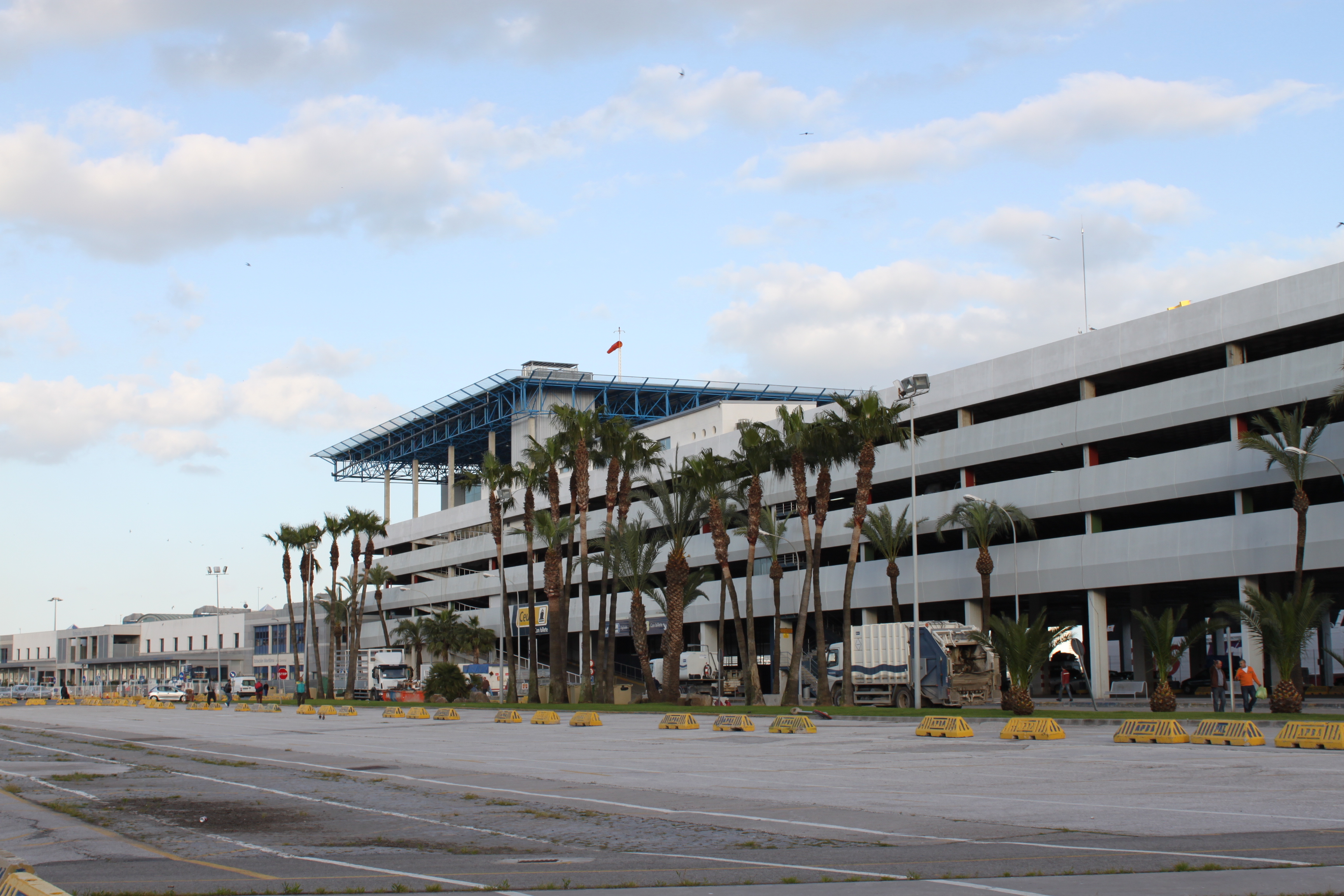 Helipuerto de Algeciras, Andalucía, España